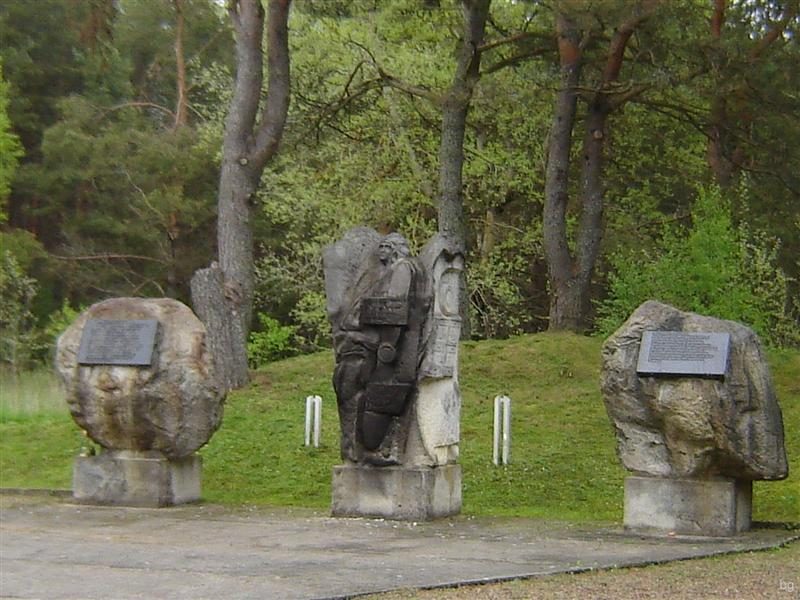 Widok pomnika.